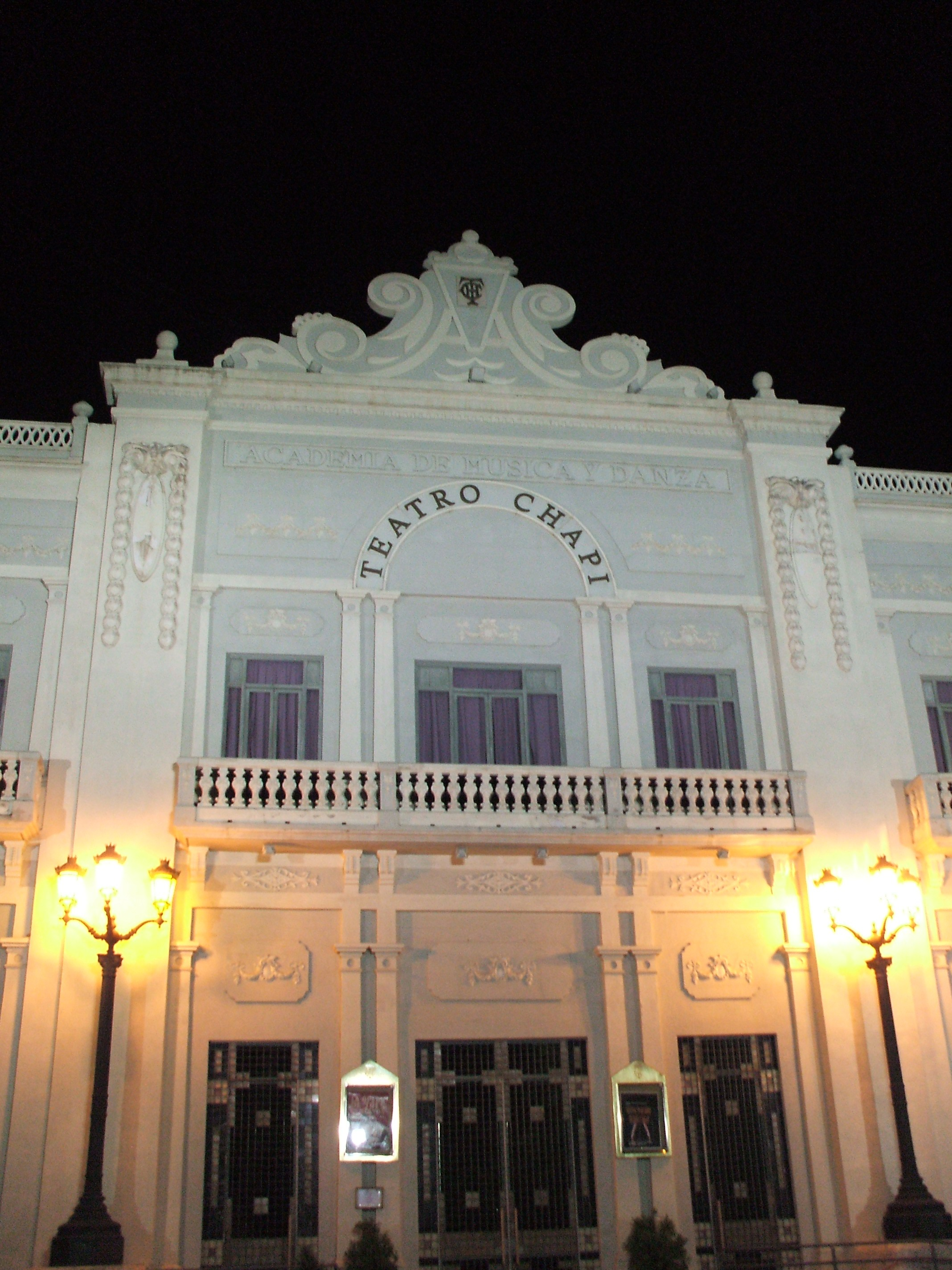 puerta principal del Teatro Chapí de Villena, de noche